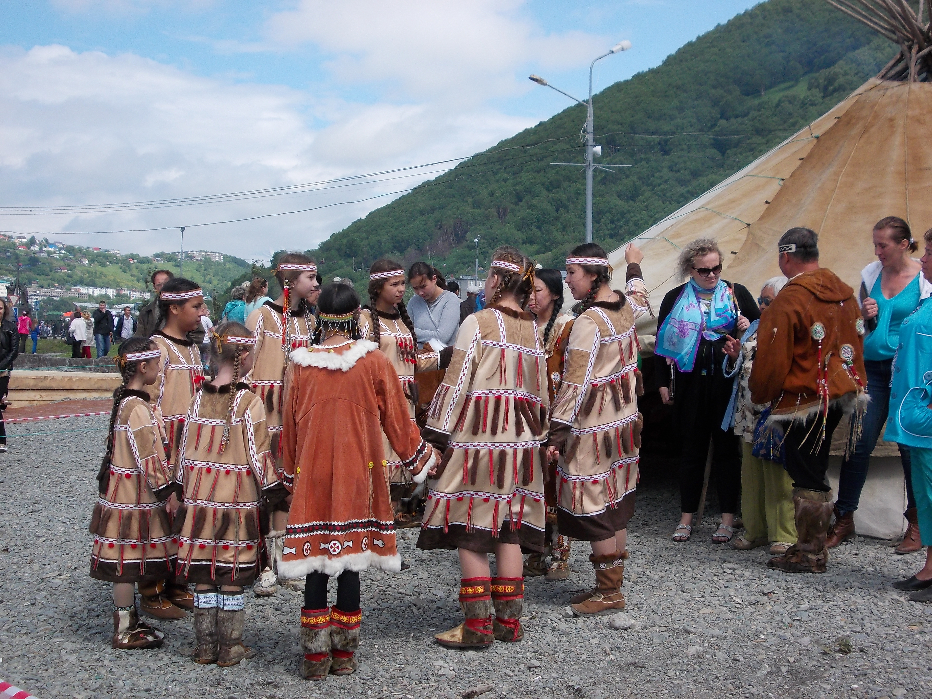 Itelmeński zespół taneczny "Łucz" przed występem podczas Dnia Rybaka w Pietropawłowsku Kamczackim